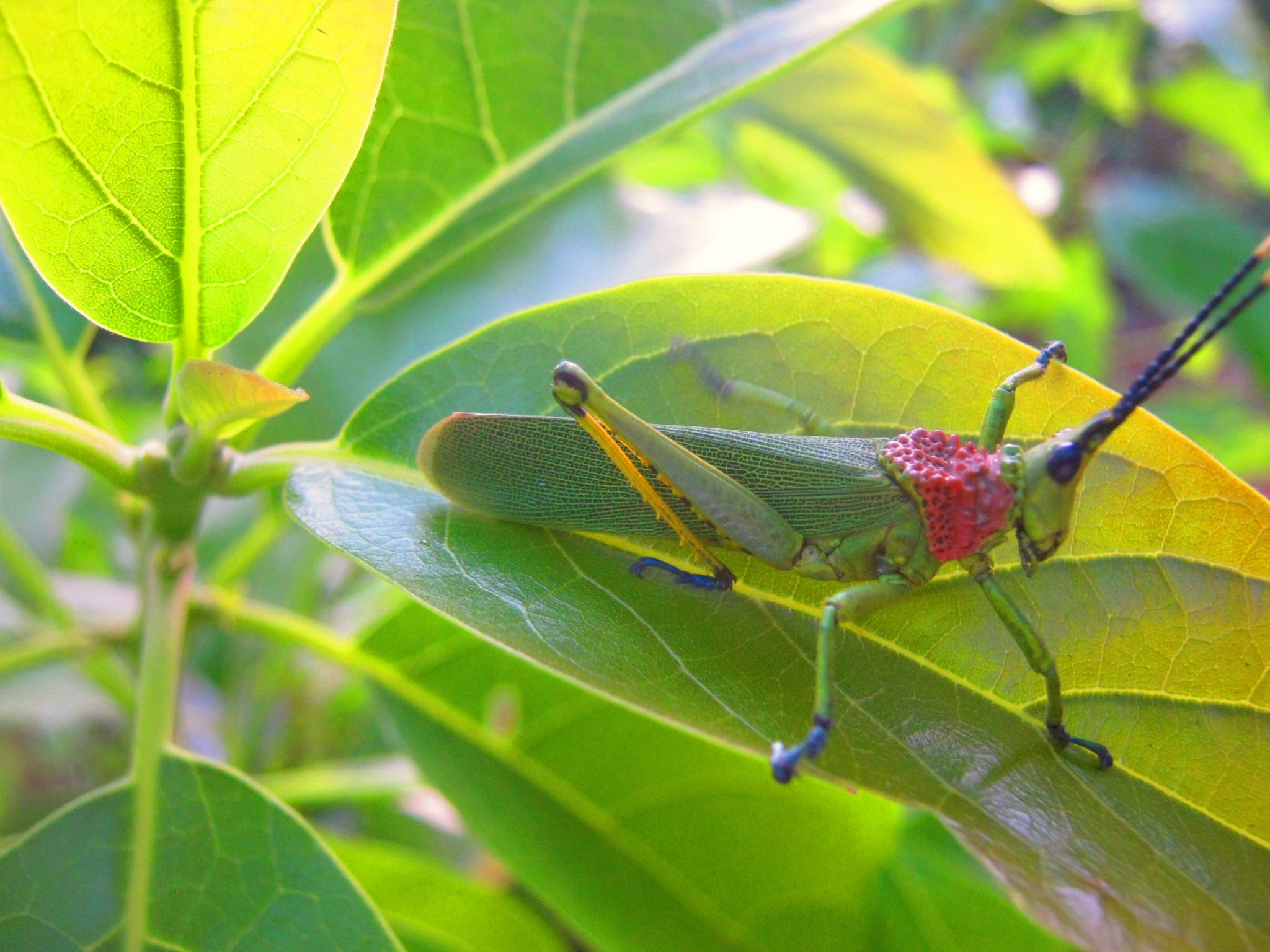 Les criquets vivent des feuilles des plantes vertes. Ce sont des herbivores